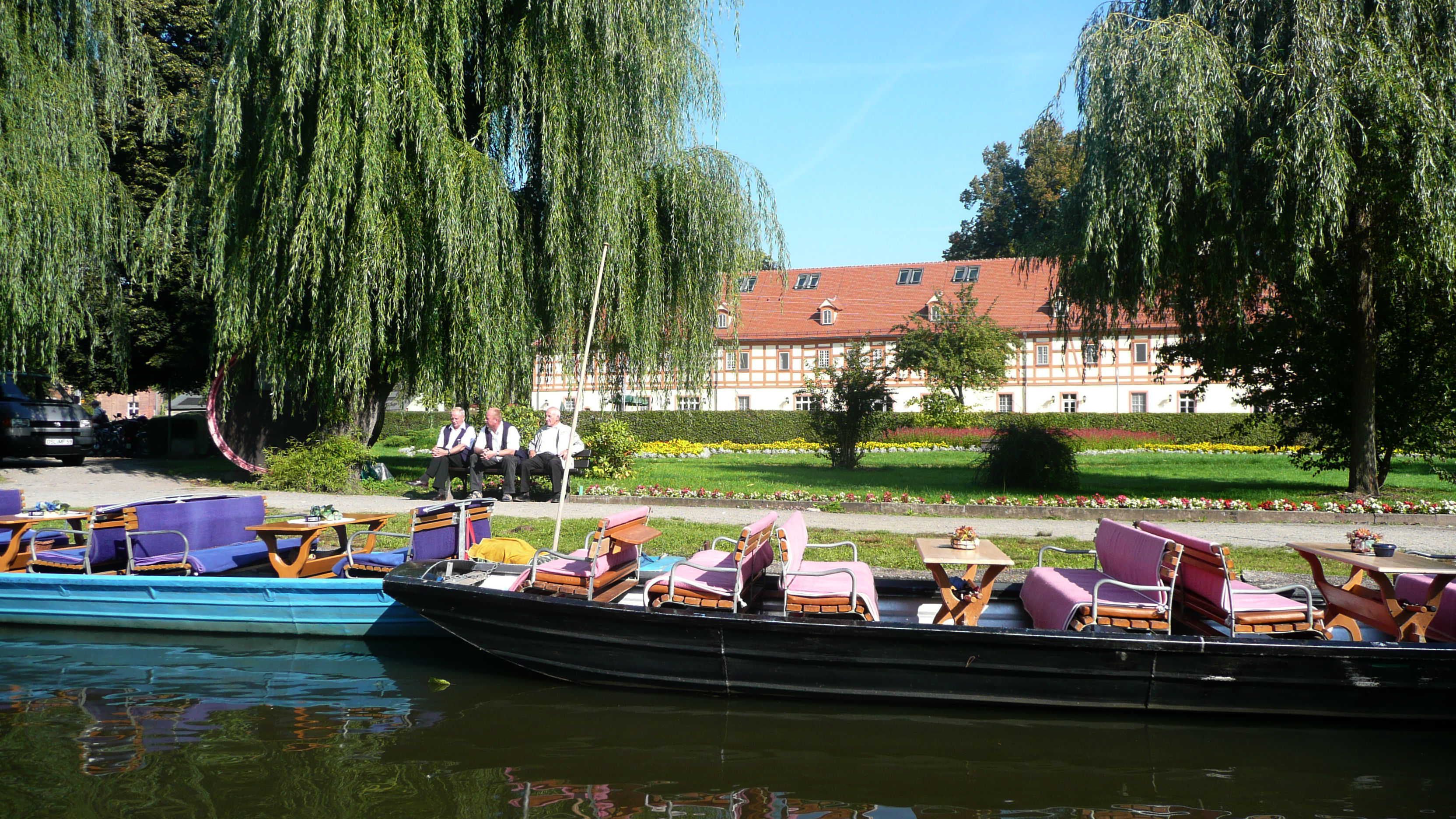 Der Marstall vom Schloss Lübbenau